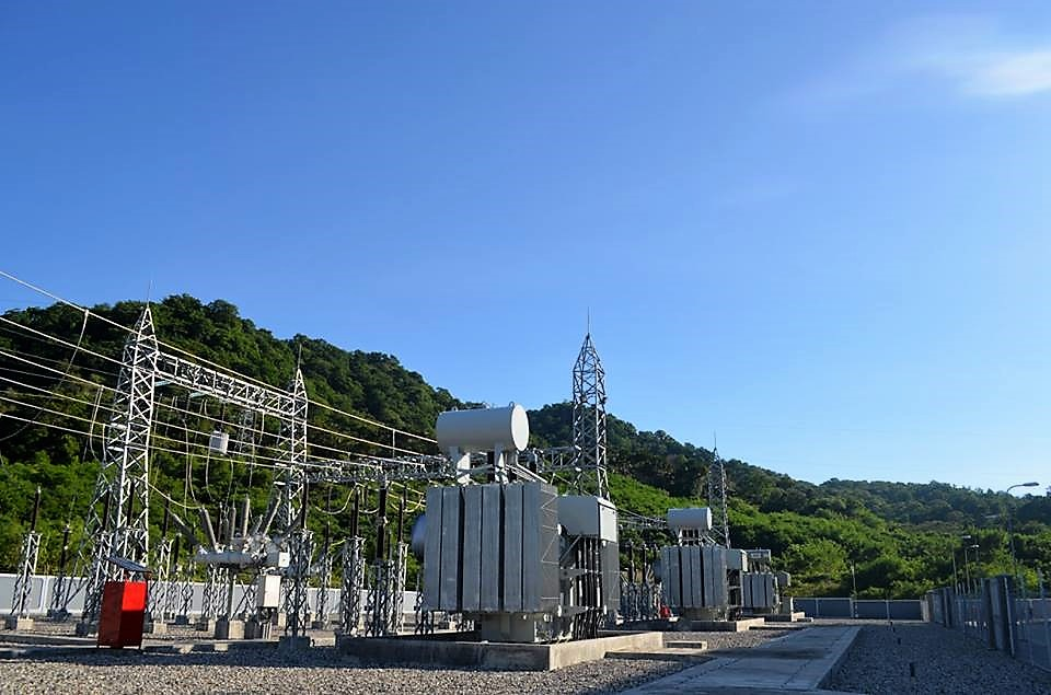 Central Eléctrica de Betano